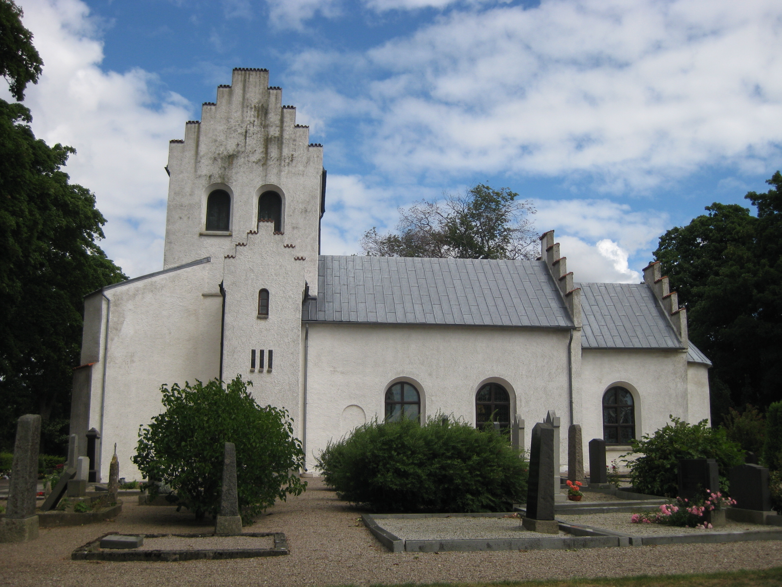 Övraby kyrka i Skåne